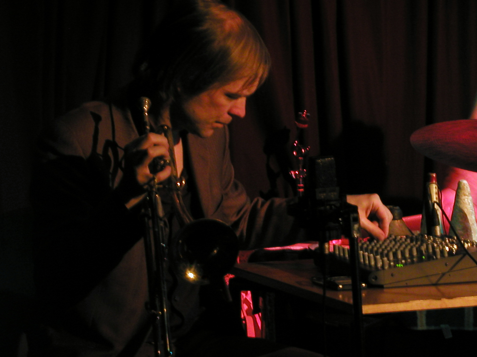 Axel Dörner mit dem Otomo Yoshihide Quartet im Weikersheimer Club W71